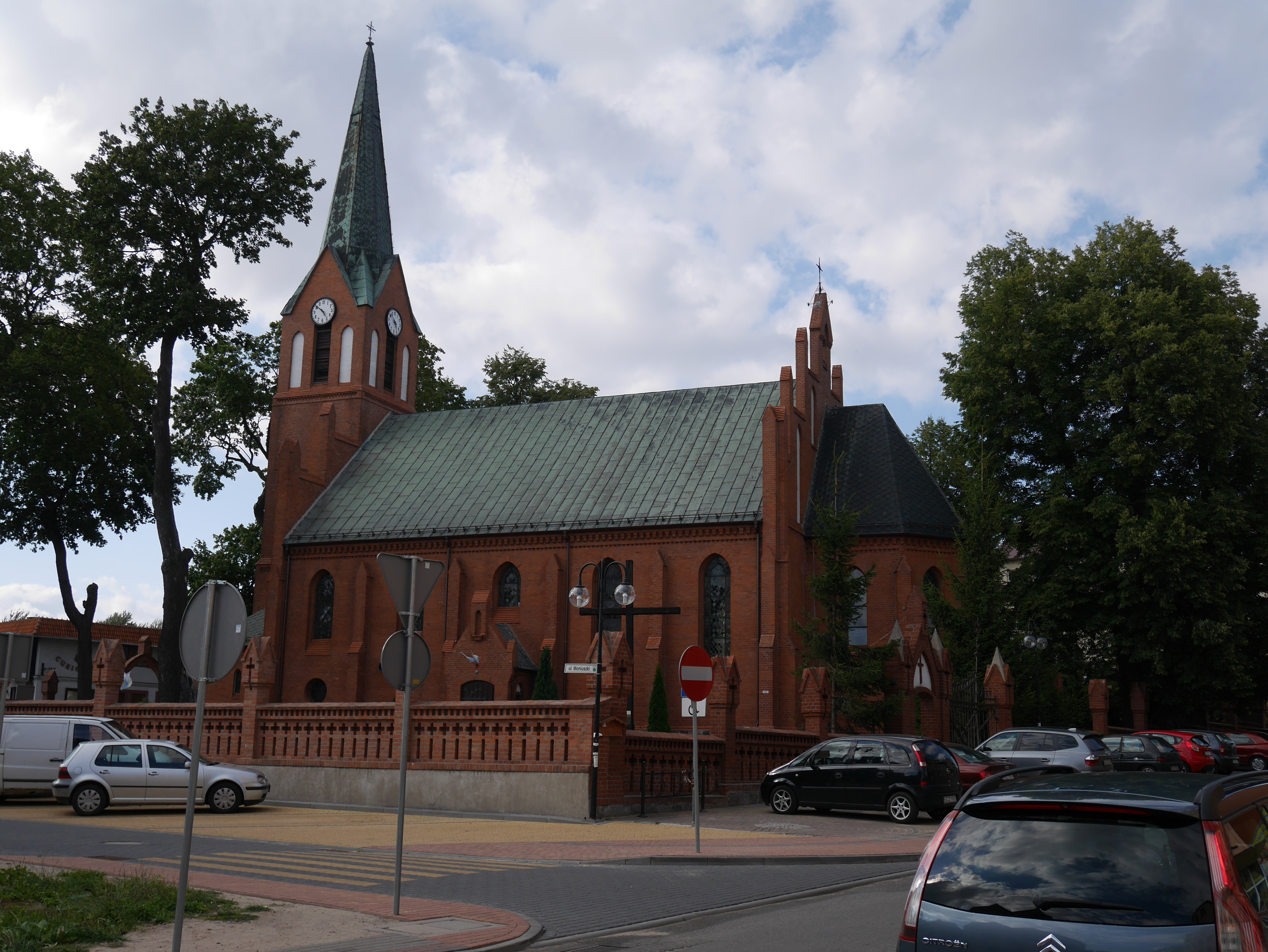 Debrzno, kościół par. p.w. Wniebowzięcia NMP, 1894-1895